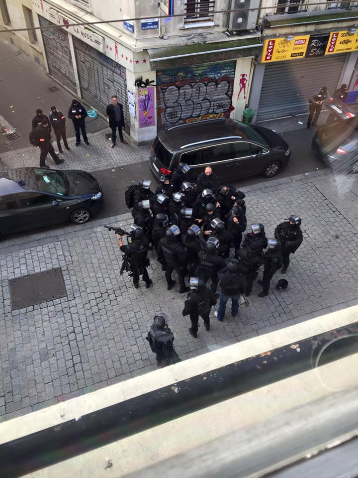 L'intervention policière à Saint-Denis contre un logement de terroristes présumés rue du Corbillon le 18 novembre. Vue de la rue de la République Saint-Denis